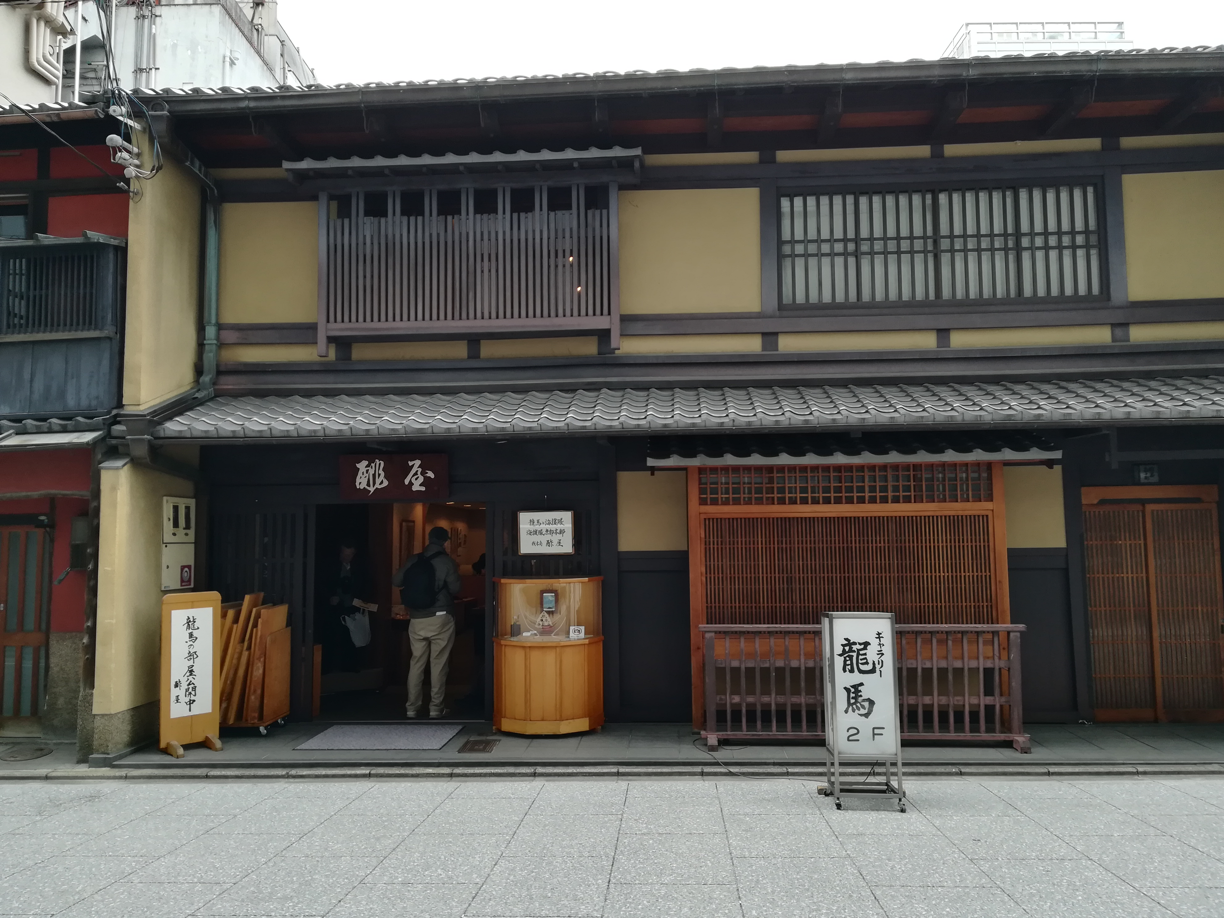 京都にある材木商酢屋の写真